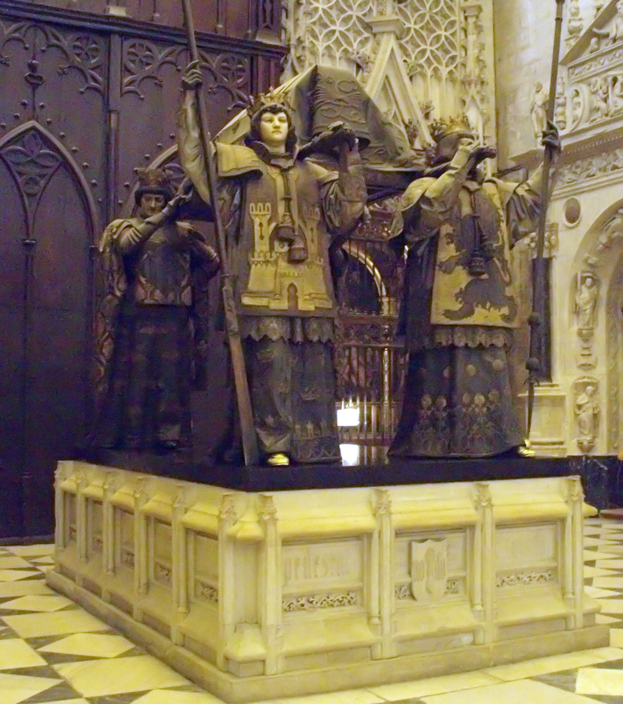 El sepulcro de Cristóbal Colón, en el brazo sur del crucero de la catedral de Sevilla, (España).